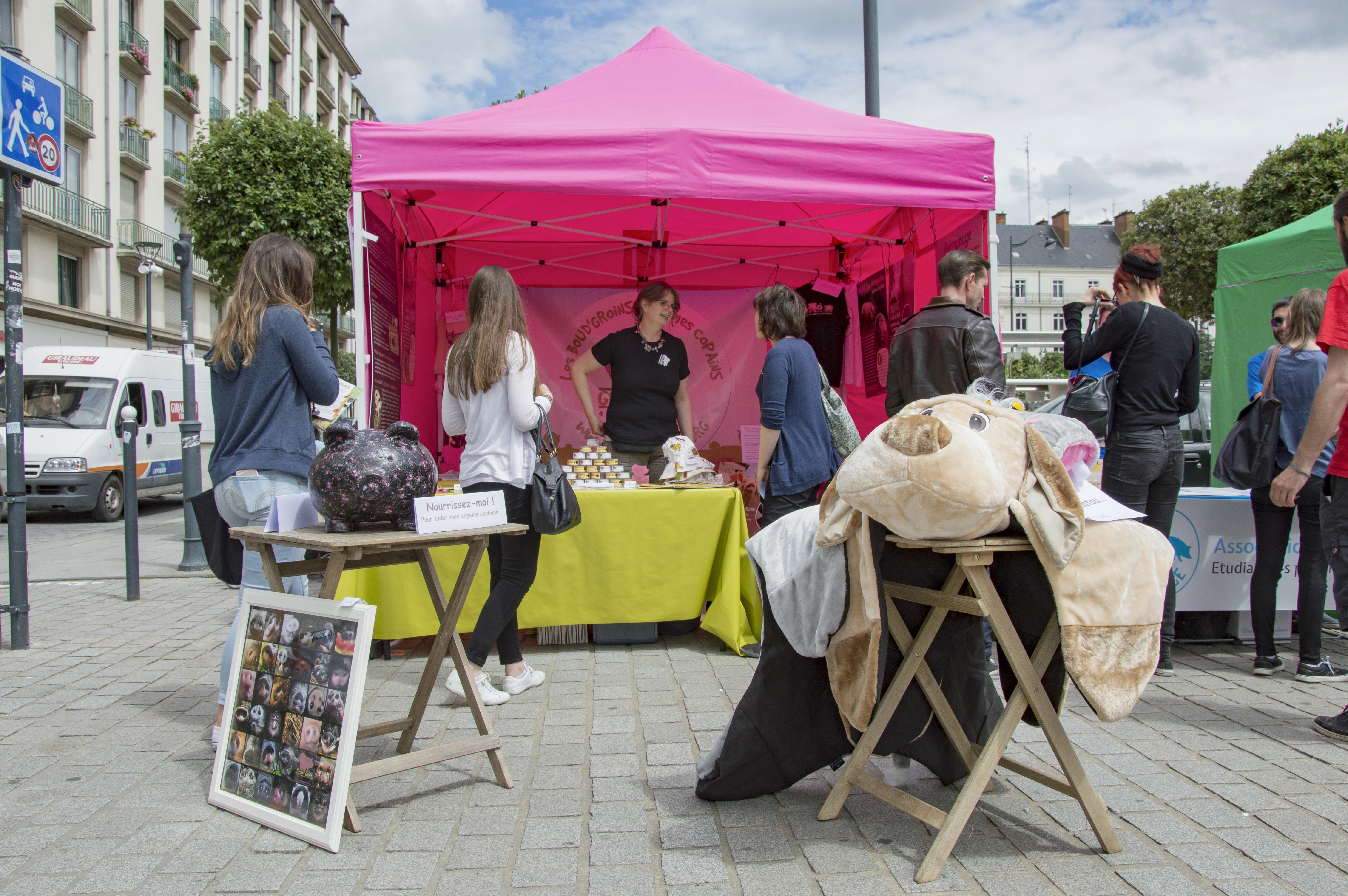 Stand du refuge GroinGroin, lors de la Vegan Place à Renne, en mai 2015 - Photo de L214 - Éthique & animaux